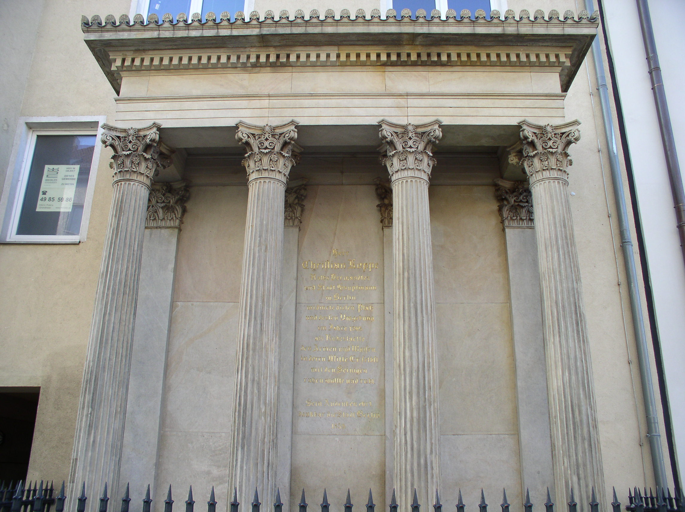 Grabmal Koppen auf dem Koppenplatz, Berlin. Architekt: Friedrich August Stüler